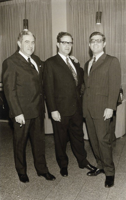 האחים חיים אבא ומאיר גירון 1960